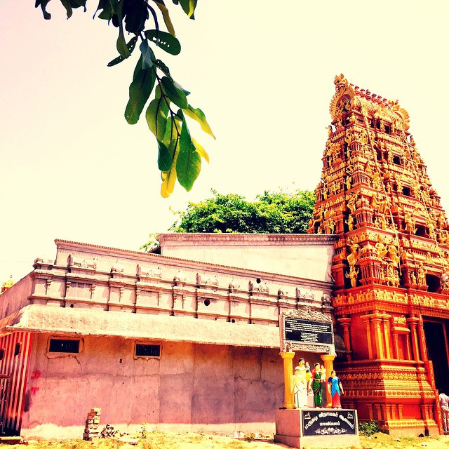 மருதடி ஆலய நுழைவாயில்